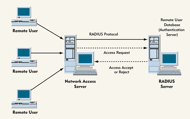 Монгол: Радиус серверийн зураг